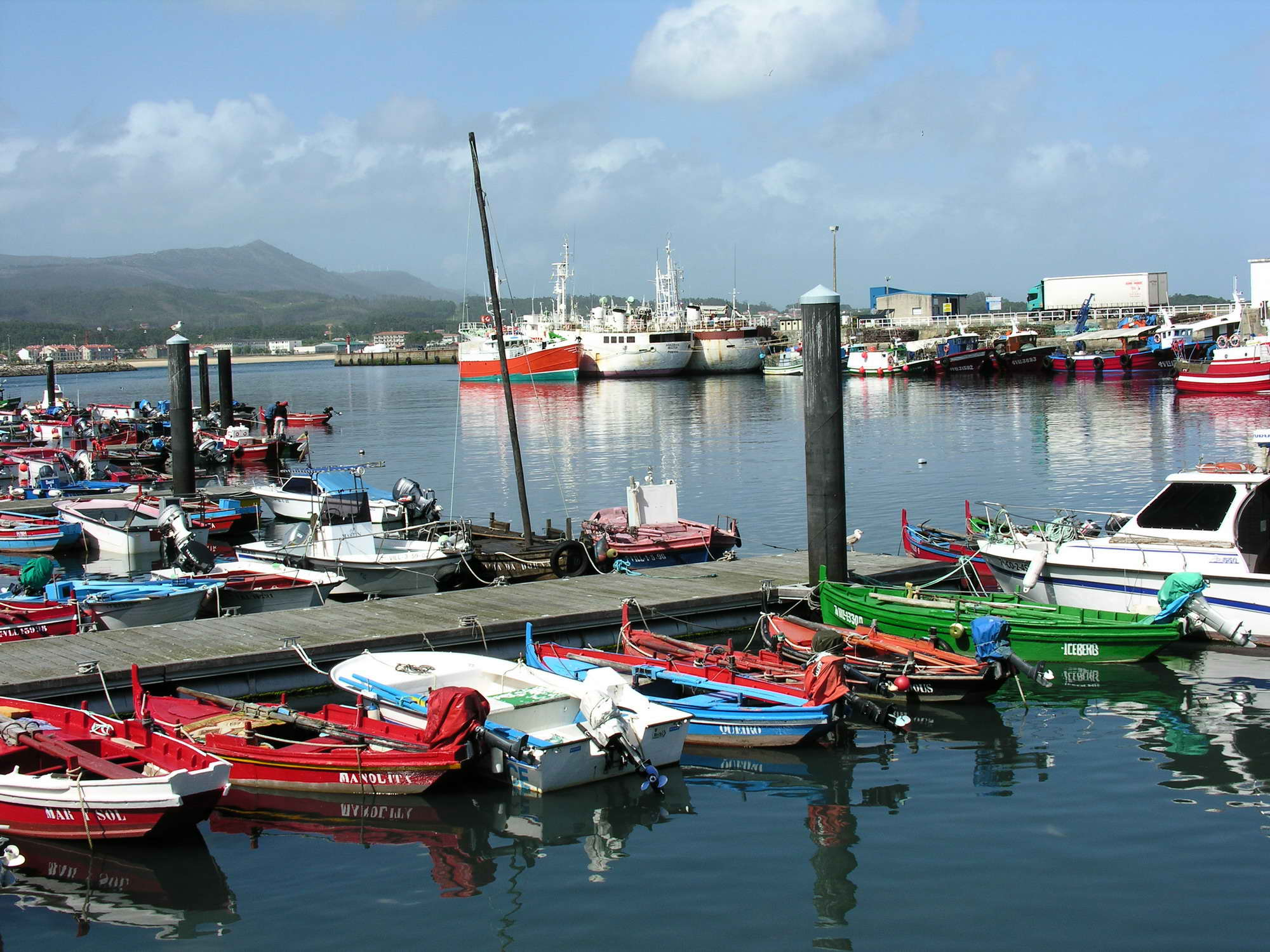 Porto de Ribeira, Galicia Publish by= Luis Miguel Bugallo Sánchez. Self made